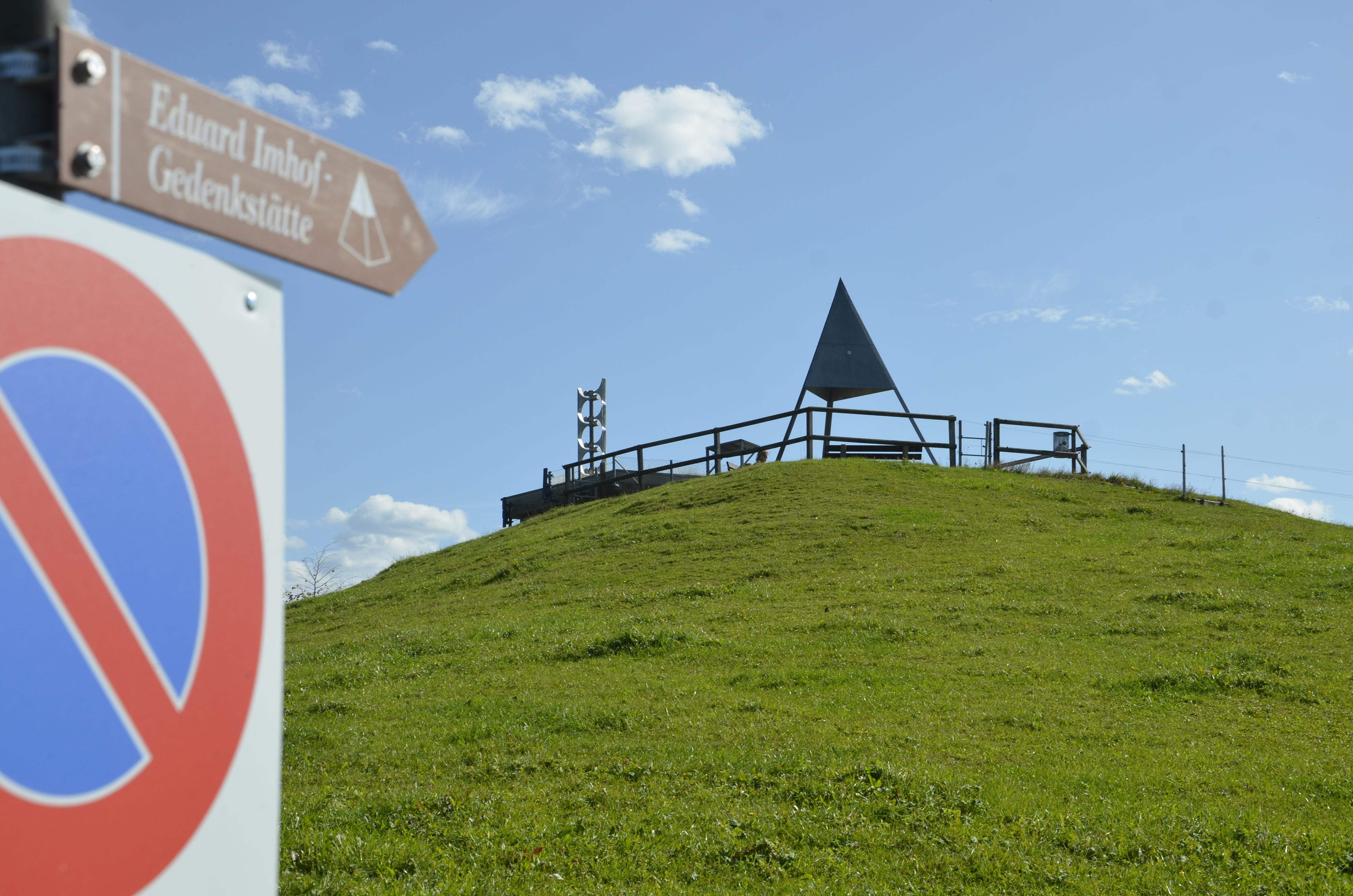 Eduard Imhof-Gedenkstätte oberhalb von Steffisburg, Kanton Bern (Schweiz)